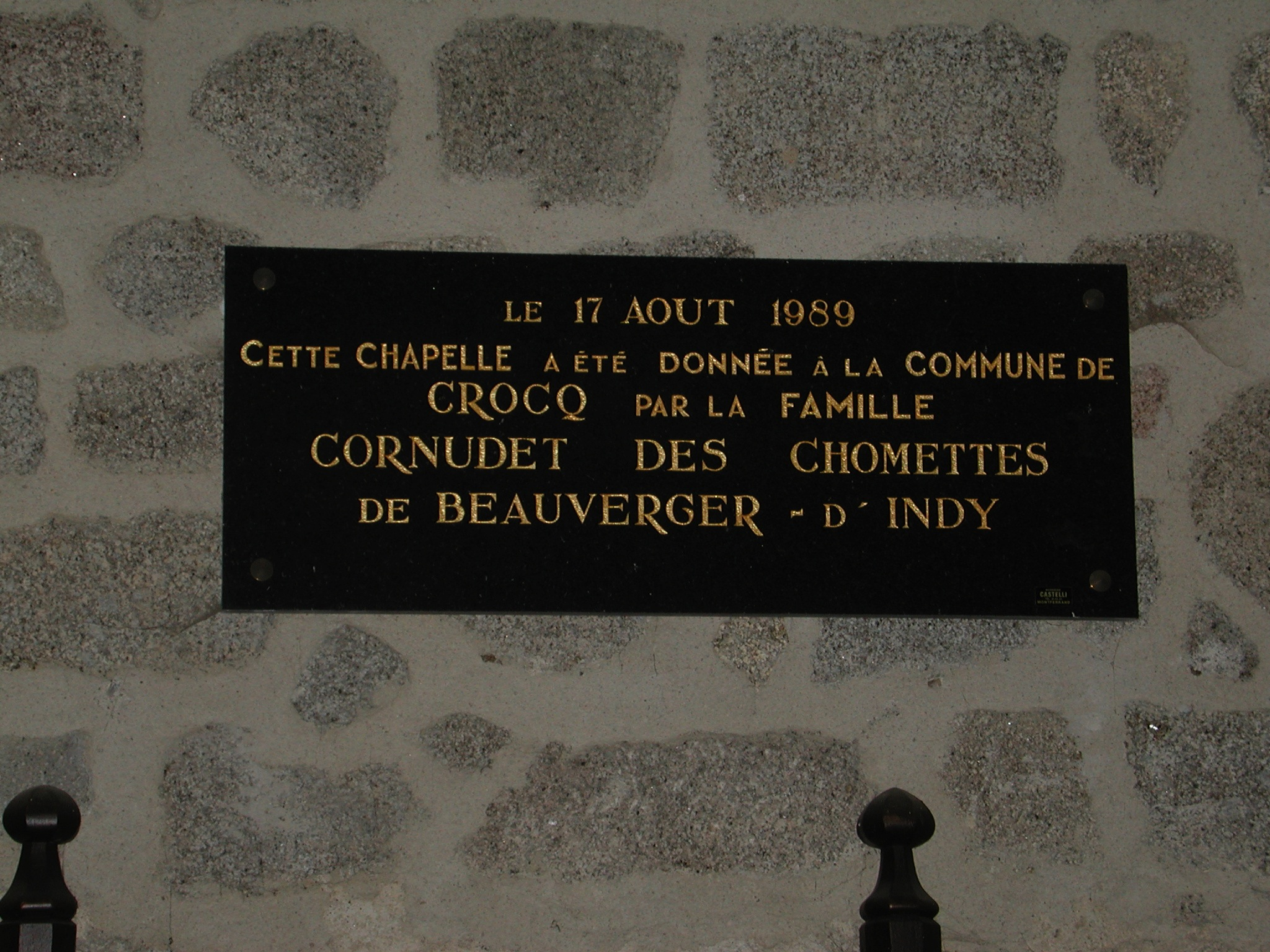 Crocq (Creuse, France). Chapelle de la Visitation. Plaque rappelant le don de cette chapelle privée à la commune en 1989.